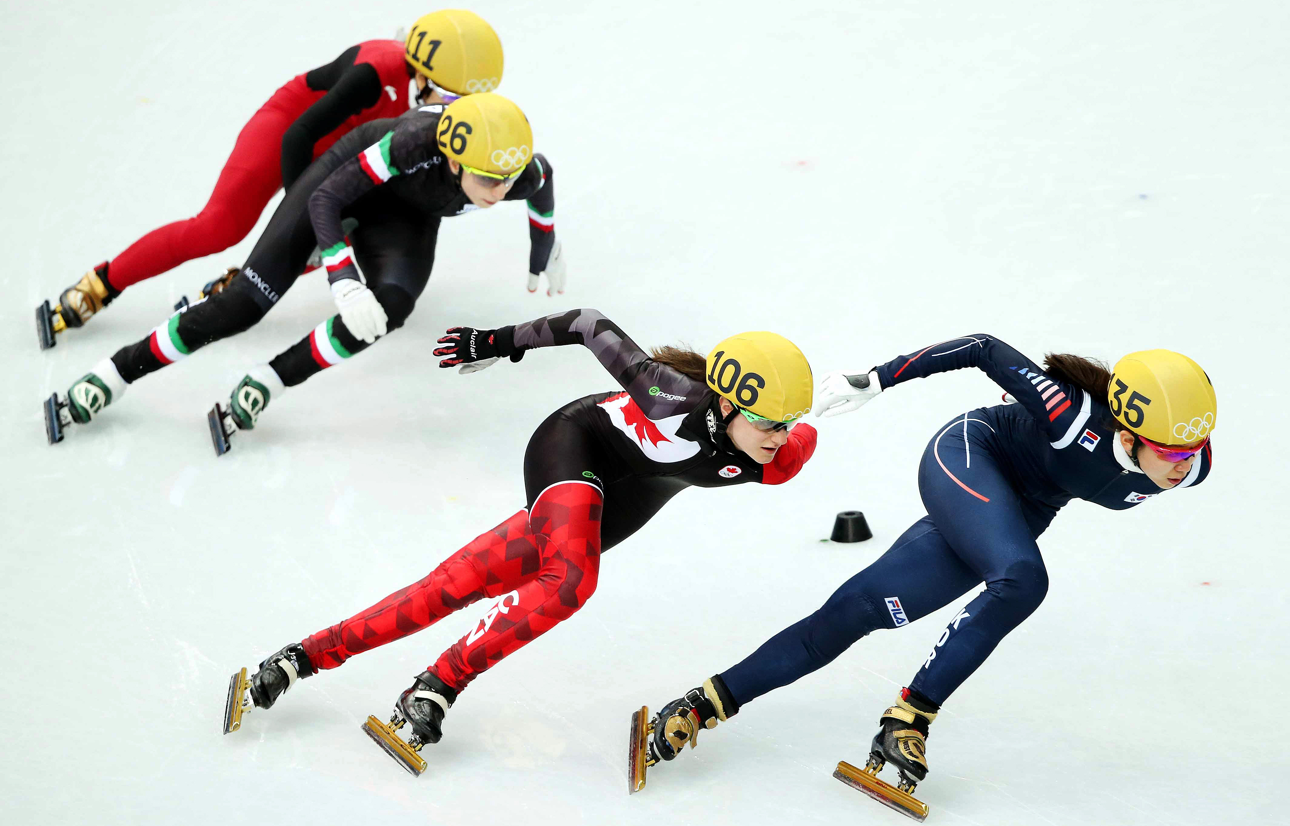 한국 쇼트트랙 여자 대표팀 ‘2014 소치 동계올림픽’ 쇼트트랙 여자 3000m 계주 금메달 획득